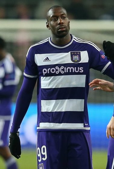 Стефано Окака - футболіст ФК Андерлехта